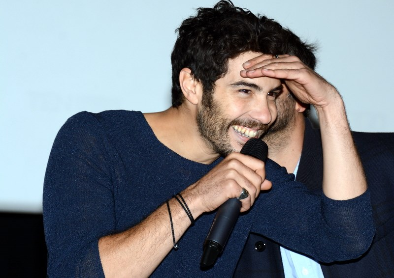 Tahar Rahim à une avant-première de "Samba"